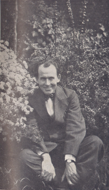 Photo de Jakez Riou parue dans la revue Stur n° 9 d'avril 1937